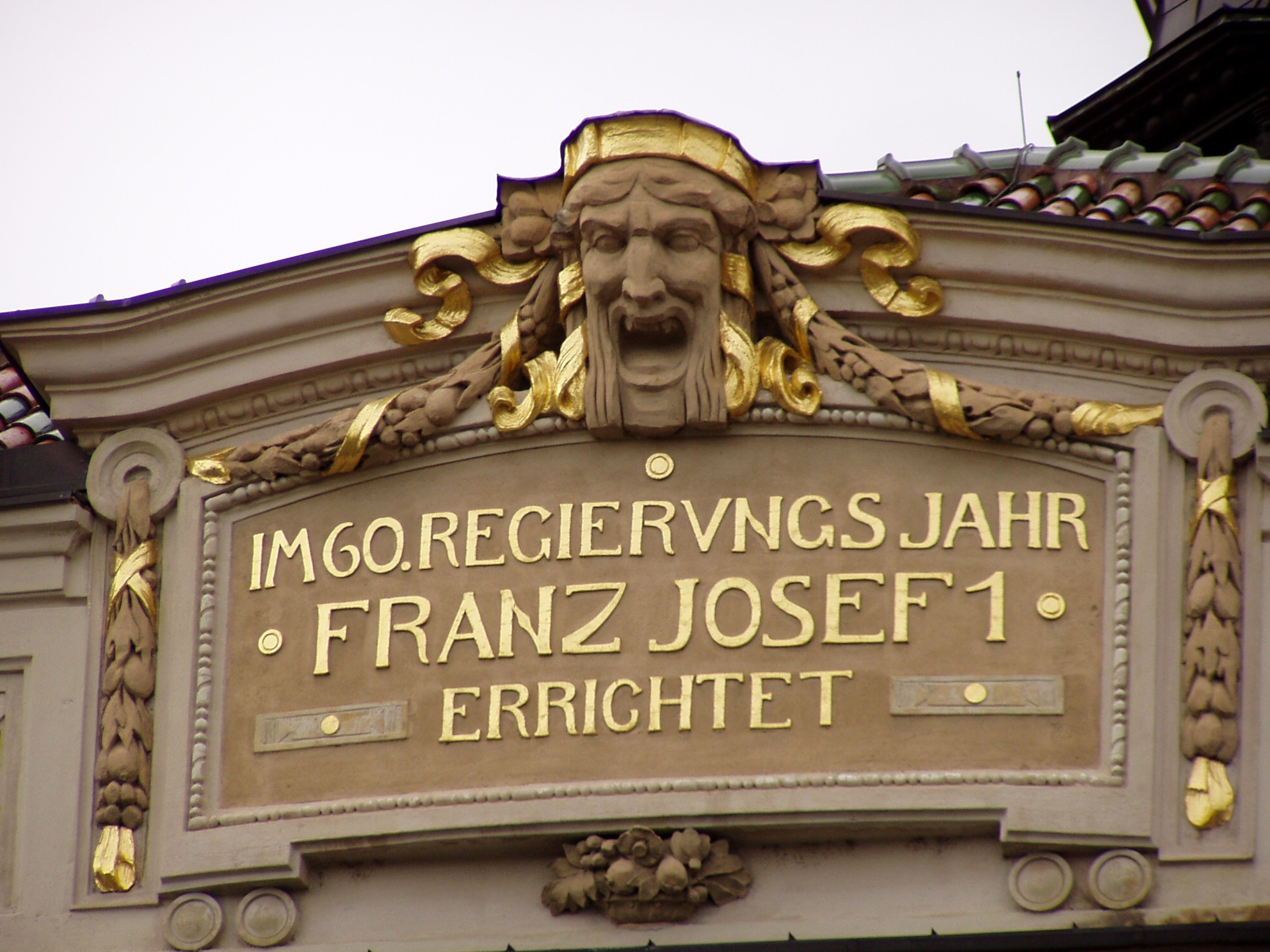 Stadttheater Klagenfurt, Detail